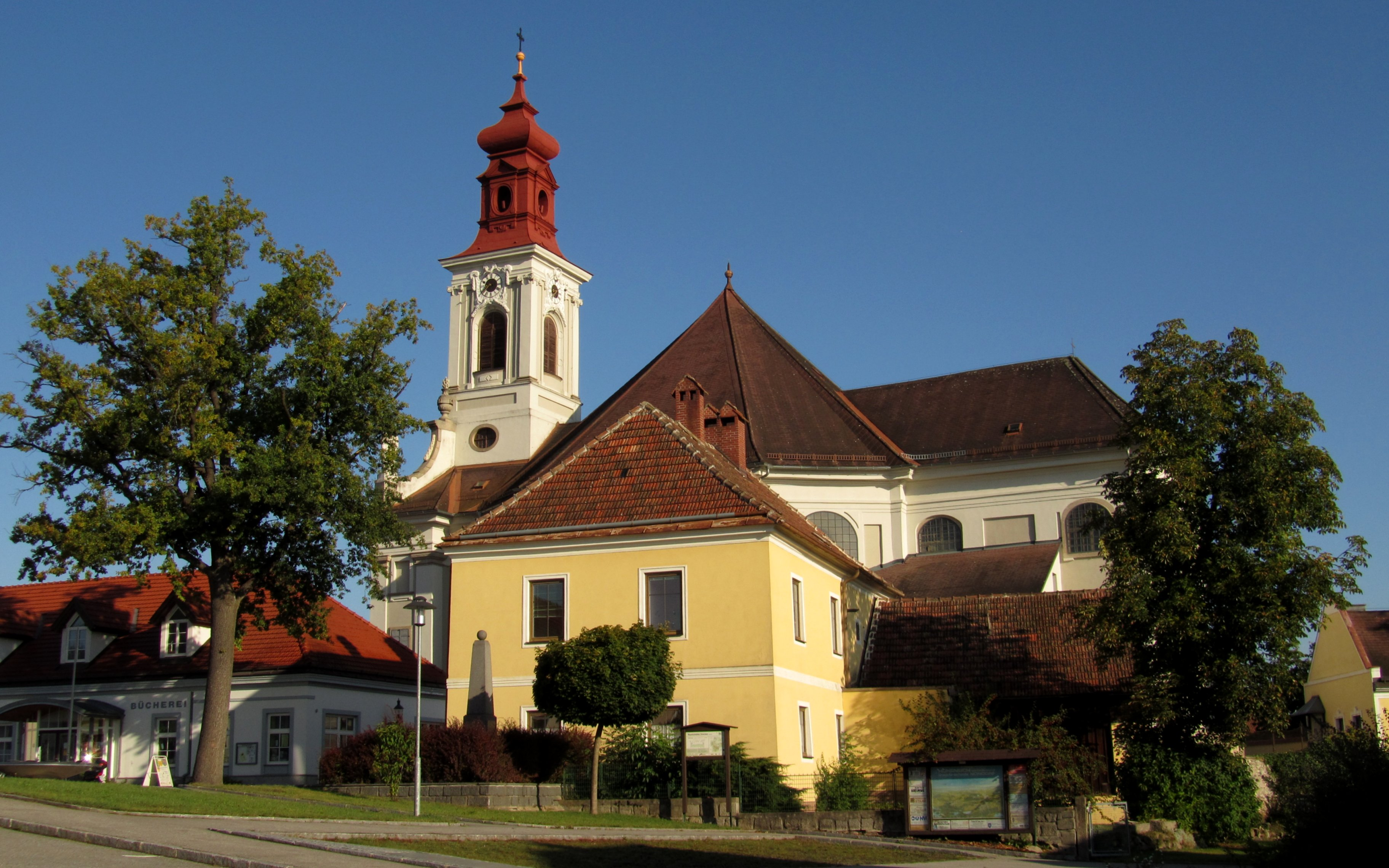 Pfarr- und Wallfahrtskirche Unbefleckte Empfängnis, ehem. Friedhof